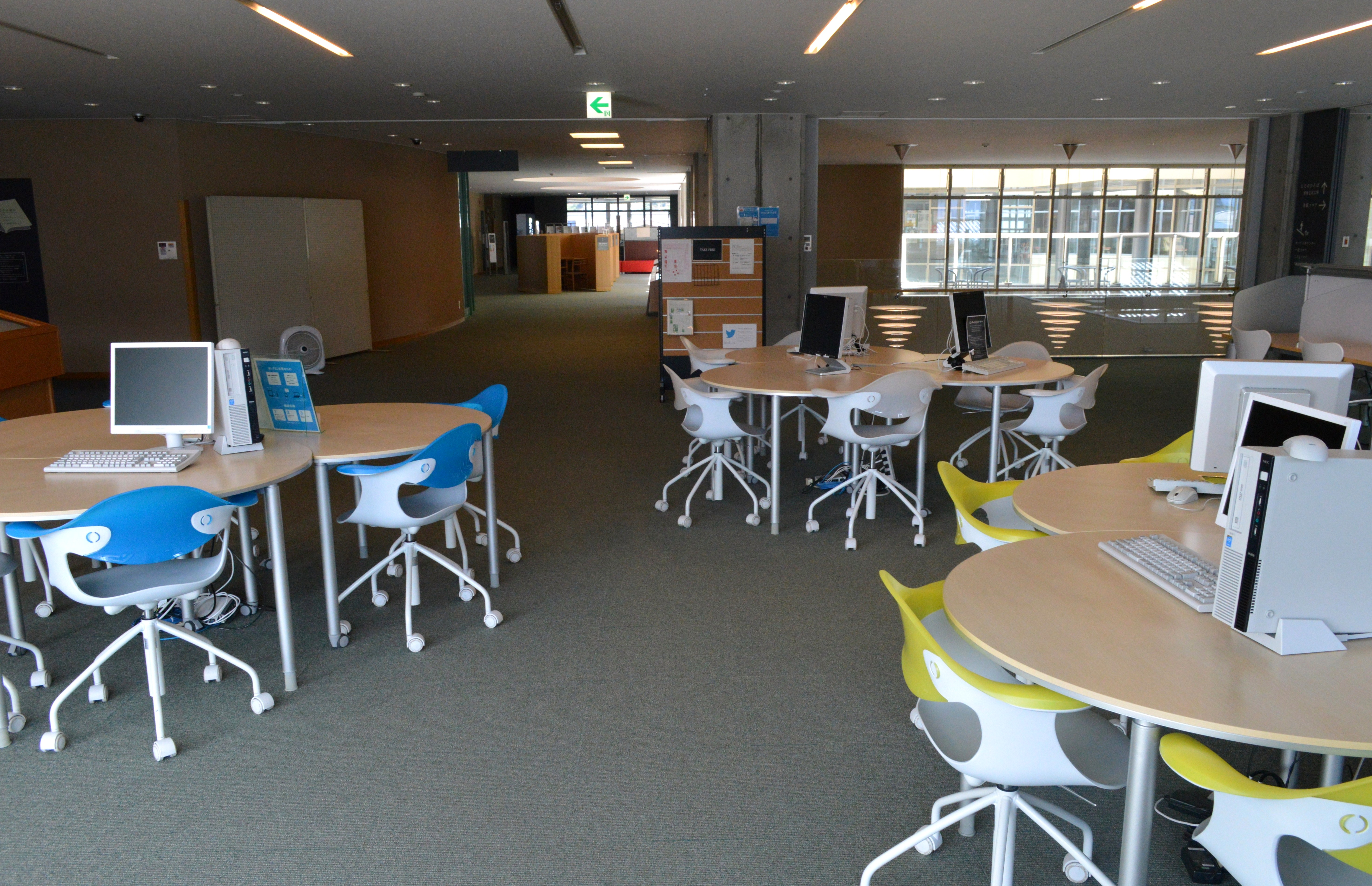 飛騨市図書館。2階のインターネット用PCコーナー。